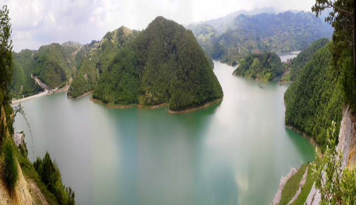 Jezero Rovni 2017